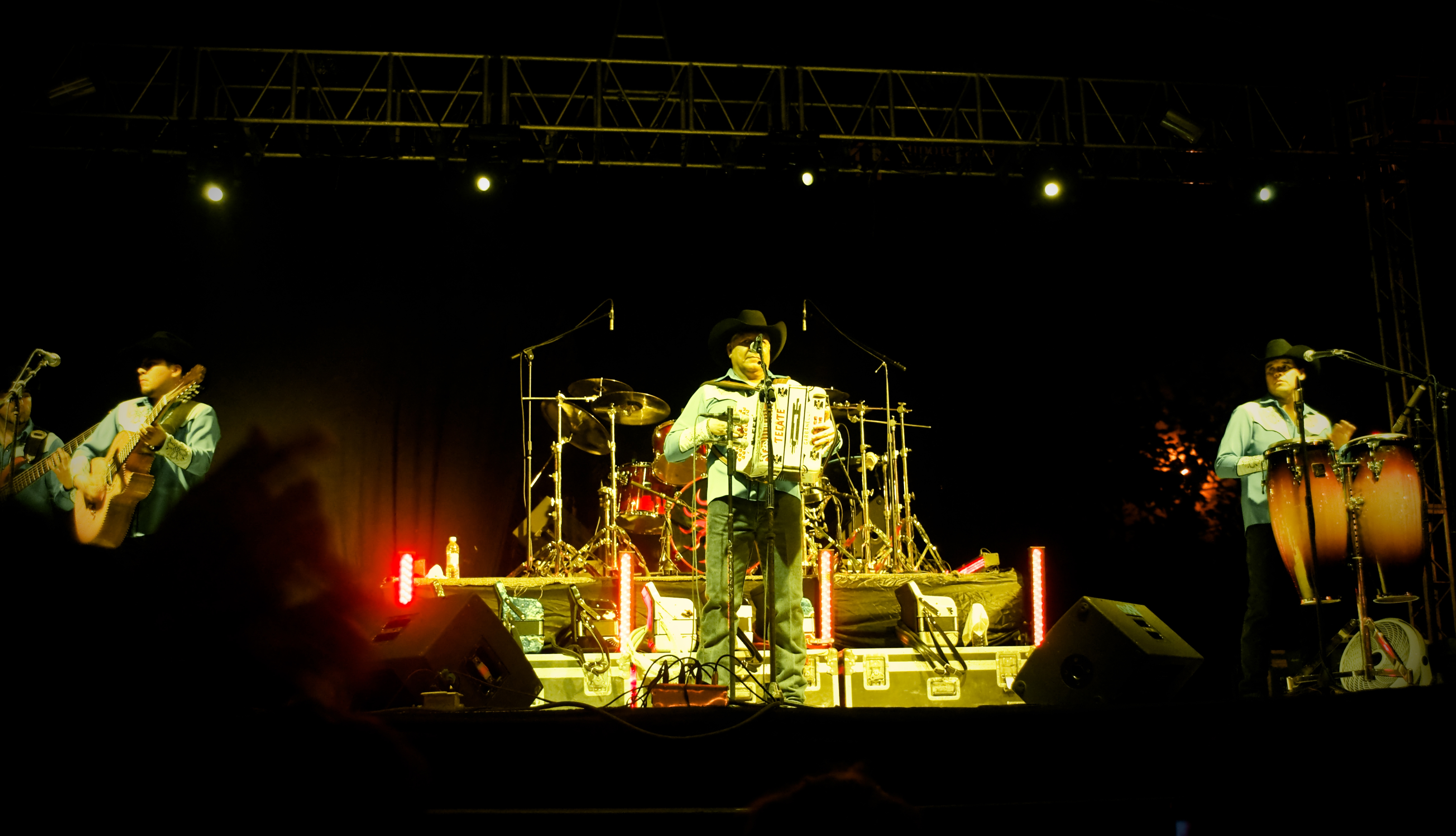 El poder del norte, 2011.